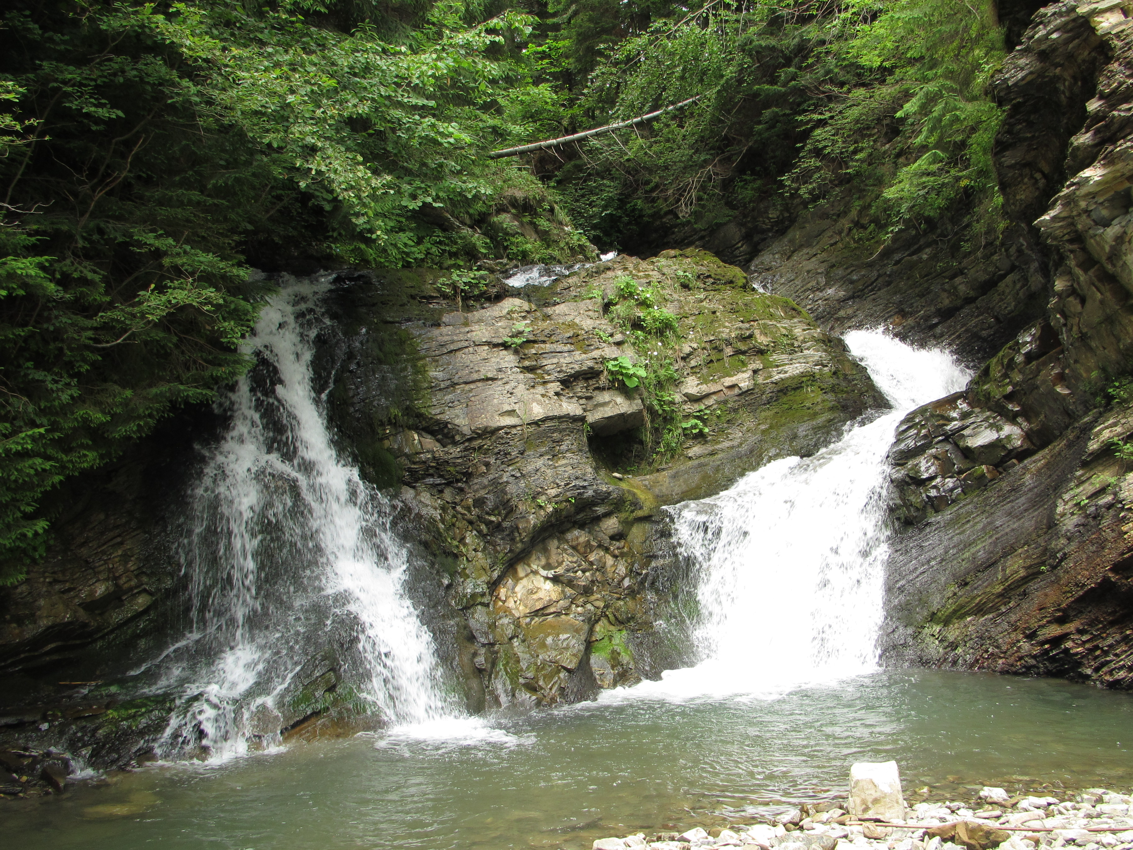 Водоспад Шепітський Гук в с. Шепіт